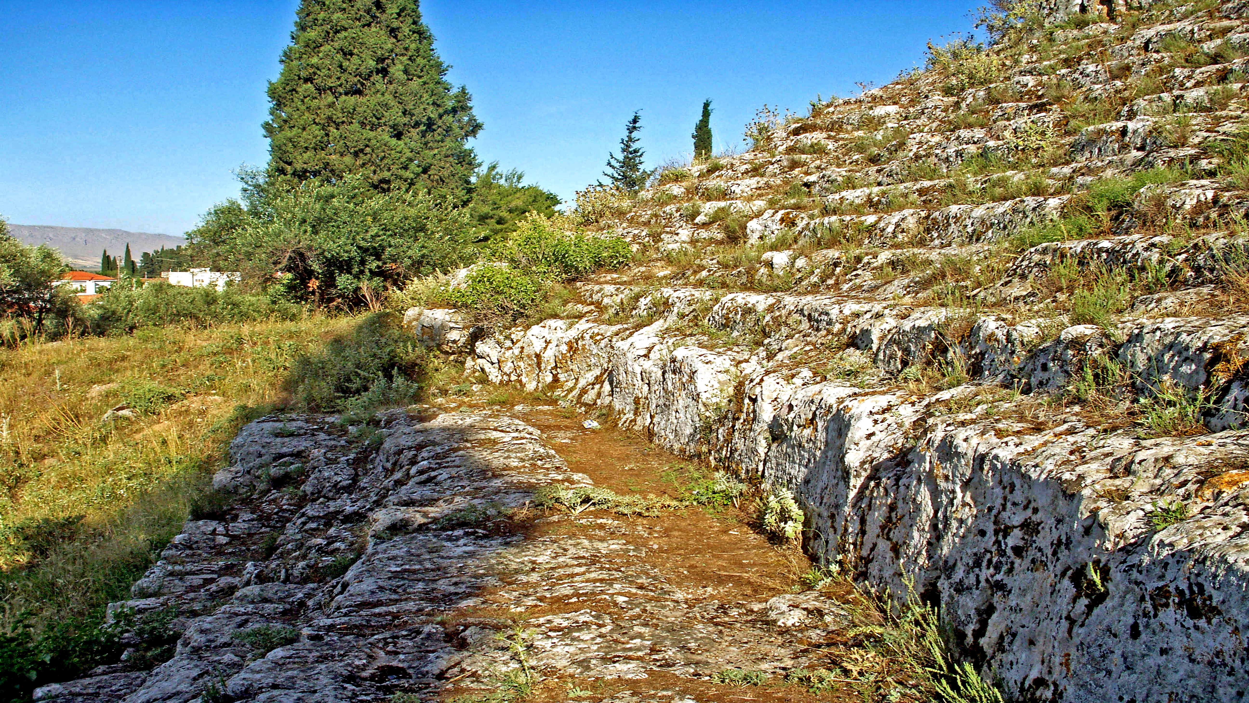 Θέατρο Χαιρωνειας. το άνω διάζωμα.«Χαιρώνεια Βοιωτίας»